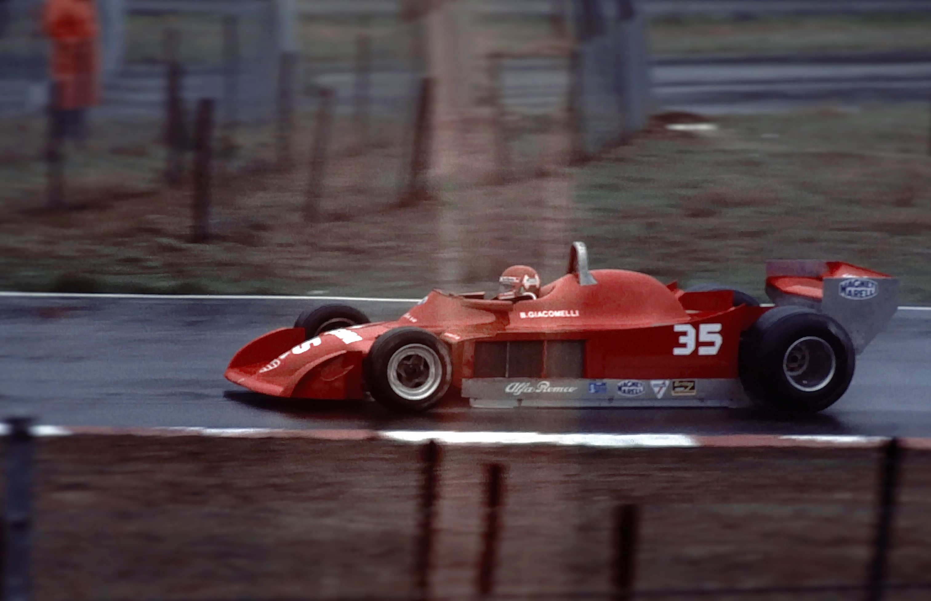 Bruno Giacomelli - Zolder - Alfa Romeo - Formel 1